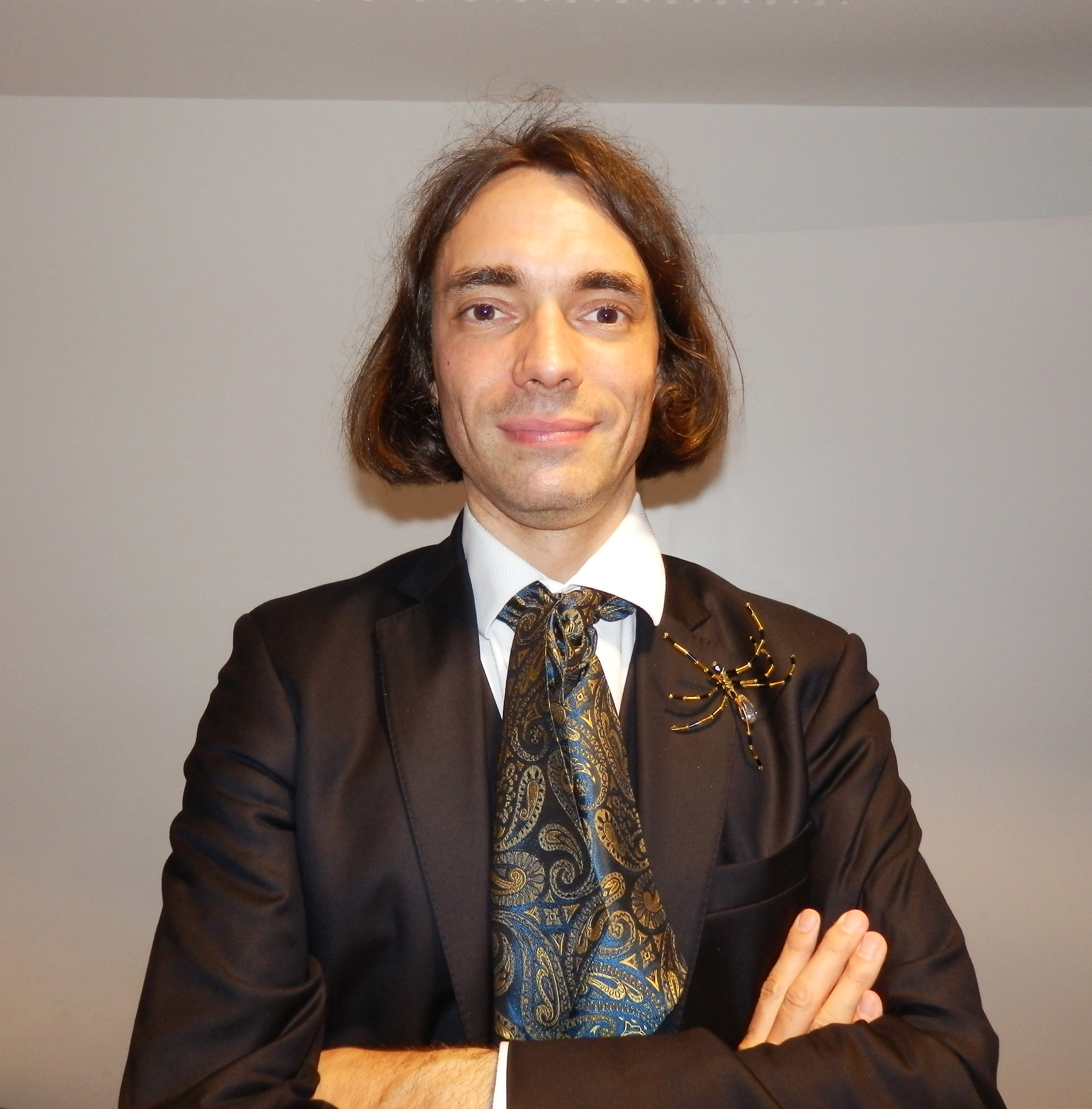 Mardi de l'Espace des sciences du 11 septembre 2012. Invité : Cédric Villani.